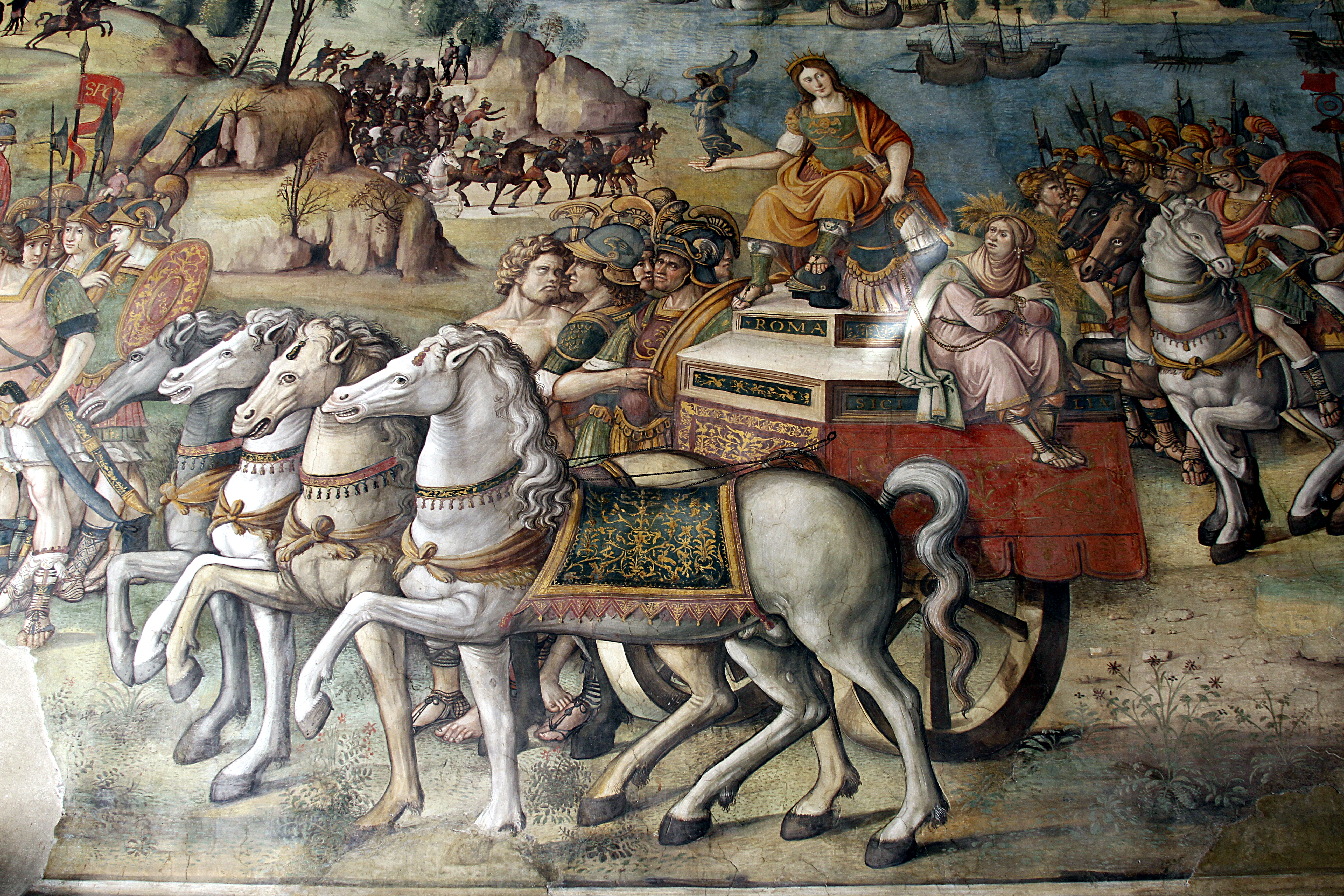 Palazzo dei Conservatori - Musei Capitolini - Rome